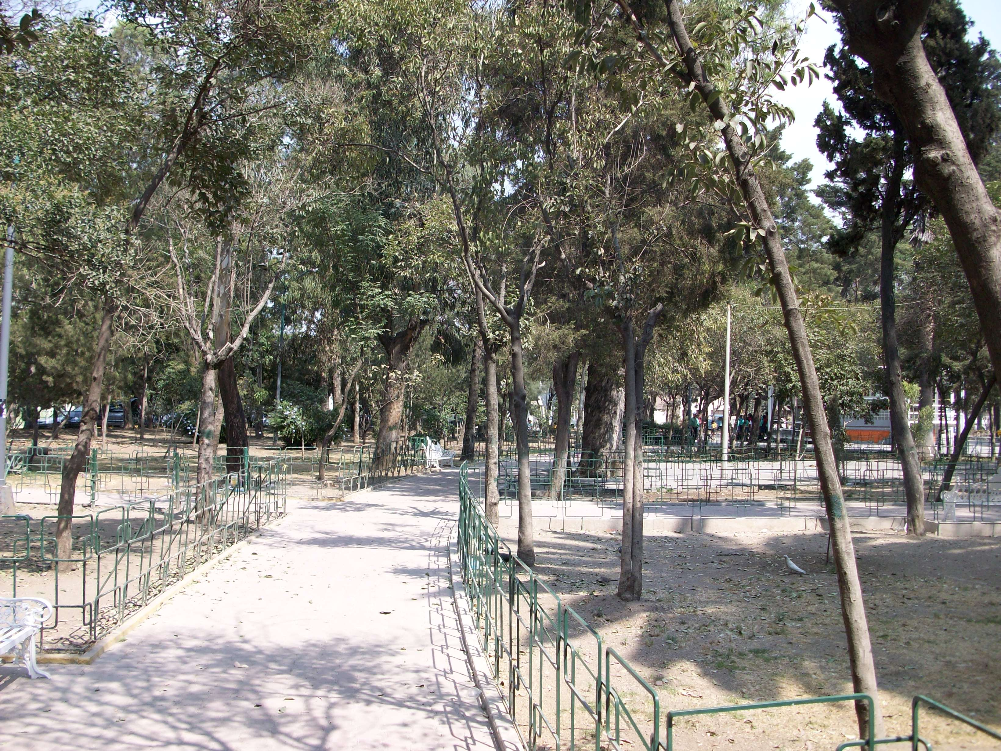 Parque Maria Luisa